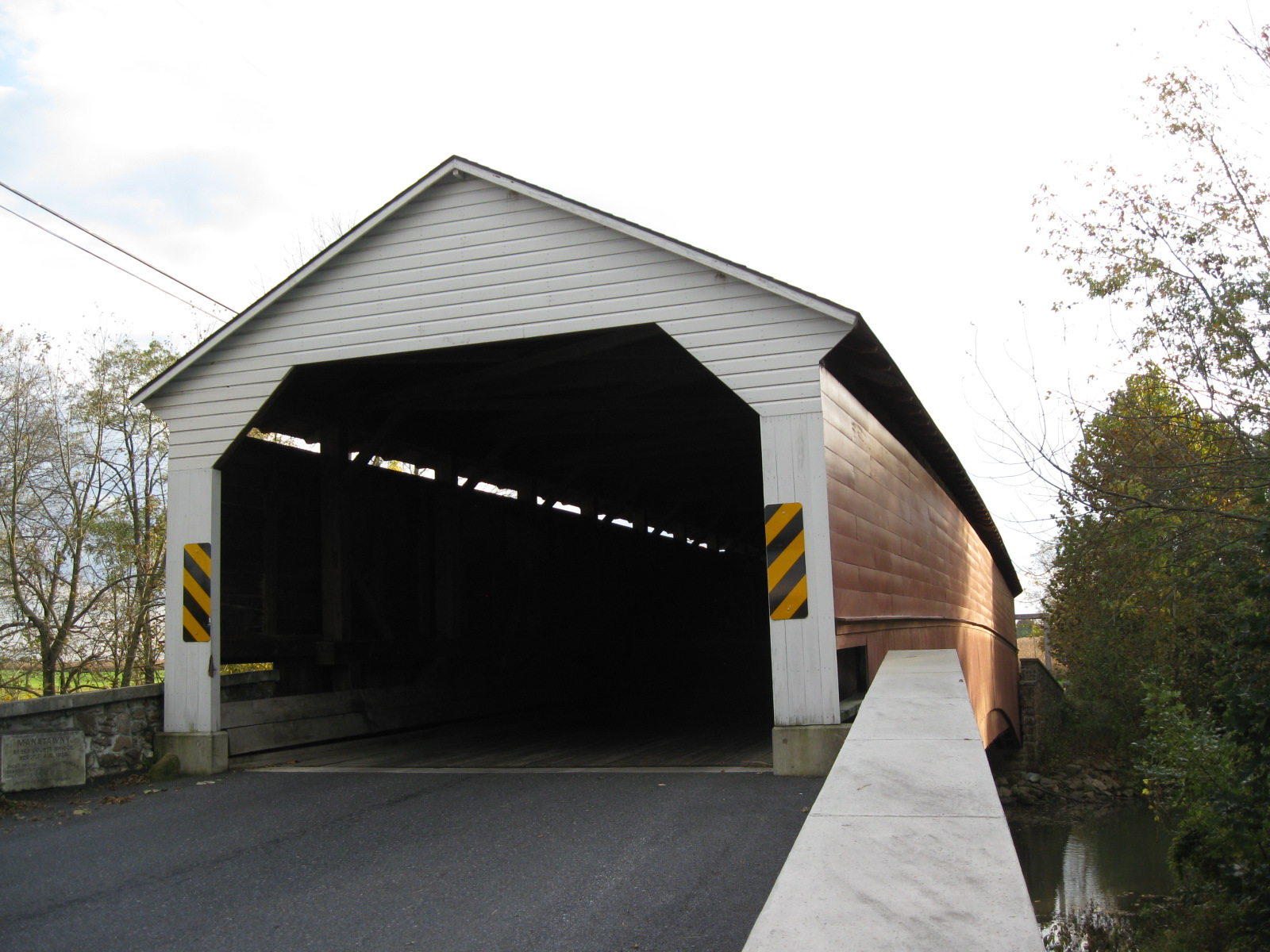 Pleasantville, Pennsylvania